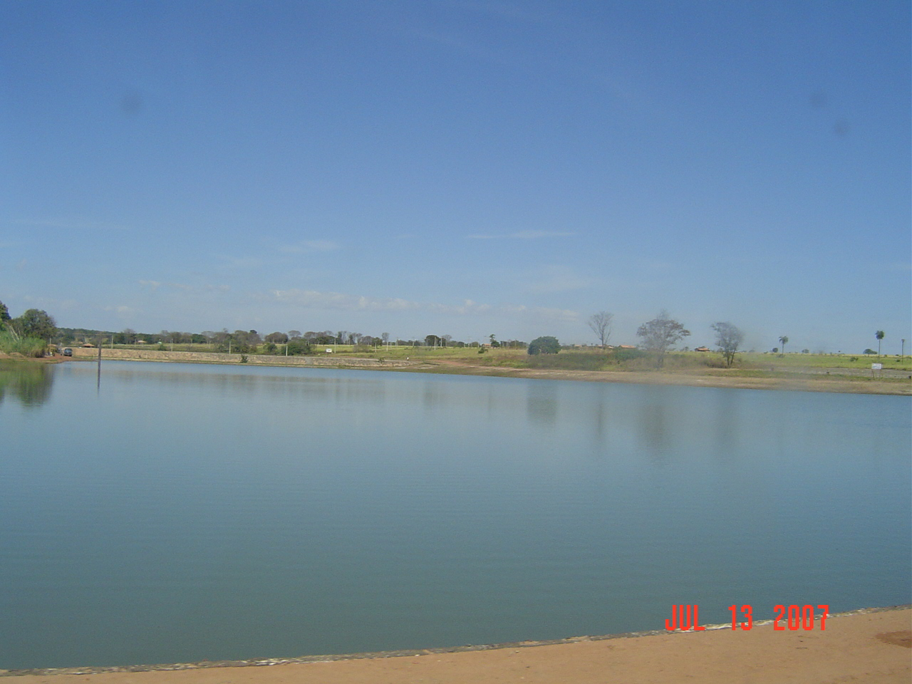 Este e o Lago do Municipio de Mozarlândia